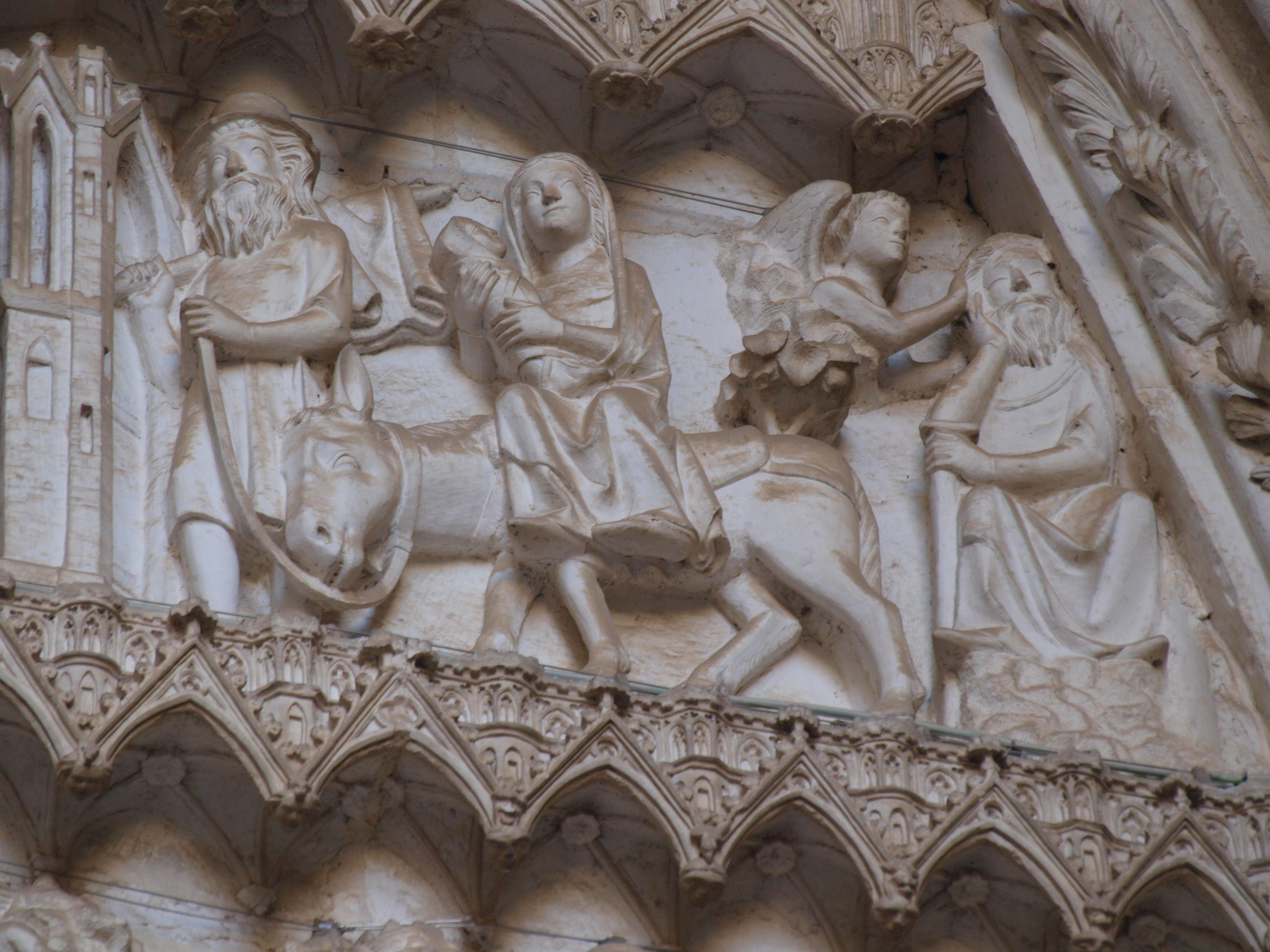 Detalle del tímpano de la Puerta del Reloj de la Catedral de Toledo